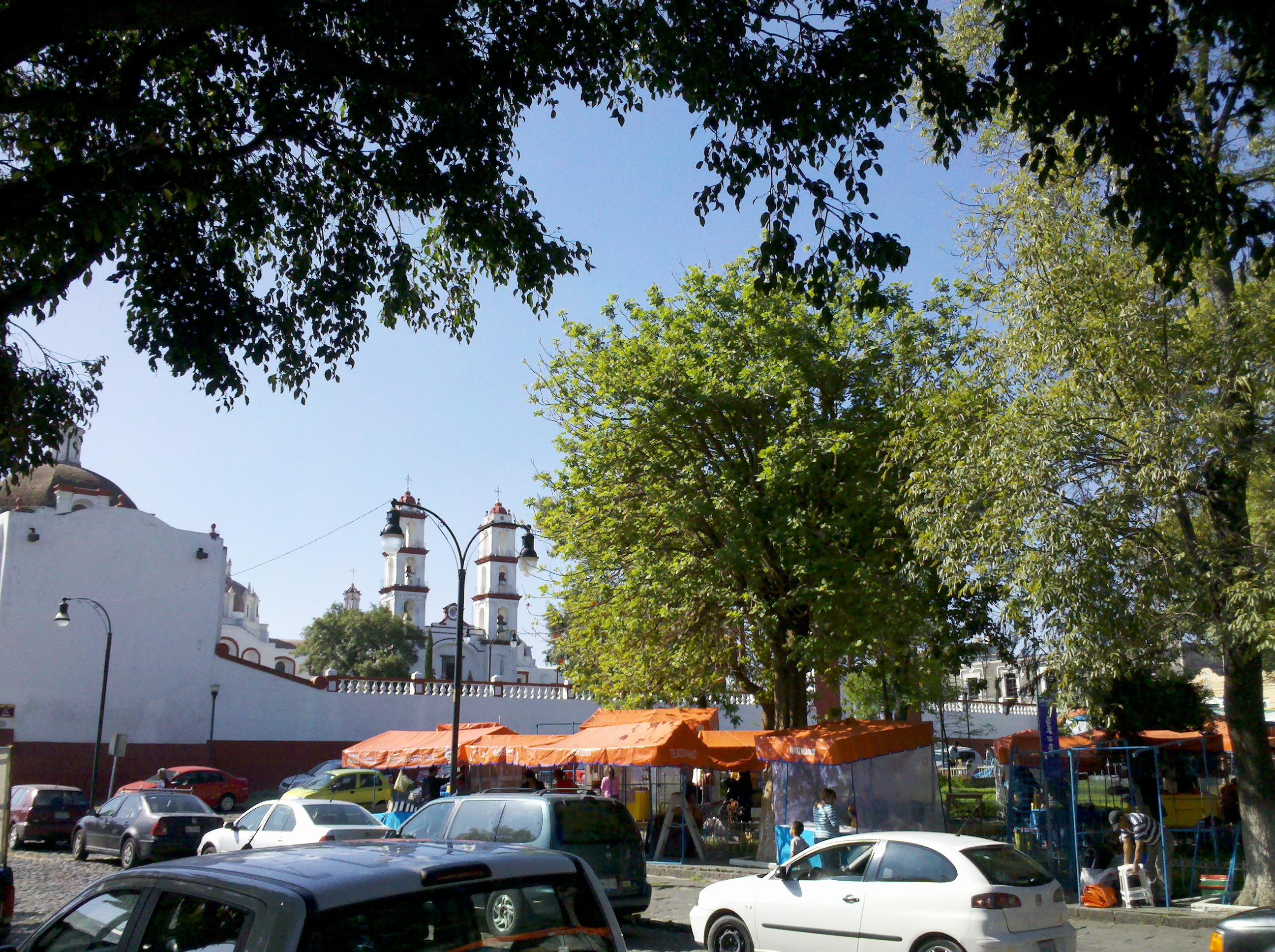 Vista del barrio de Analco en Puebla, México. Aproximadamente 5 oriente esquina con 10 sur. Se aprecia el empedrado de las calles, a la derecha el Parque de Analco con algunos comerciantes, y a la izquierda el Templo del Santo Ángel Custodio.